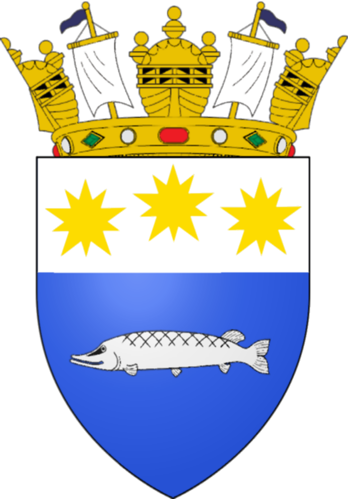 Stemma dell'antico comune di Piediluco (soppresso nel 1927 e aggregato a Terni)